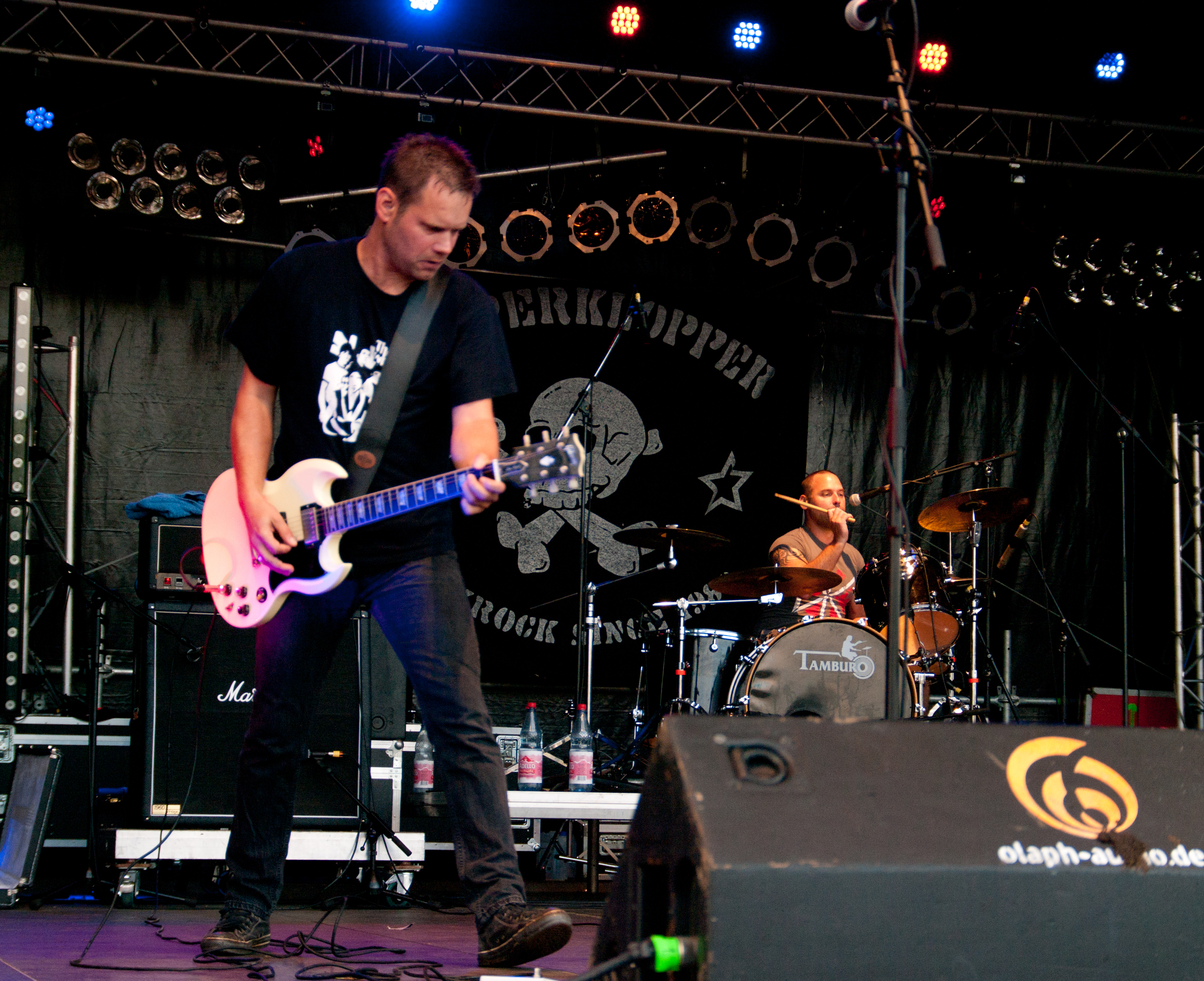 Popperklopper beim Resist to Exist Festival 2017